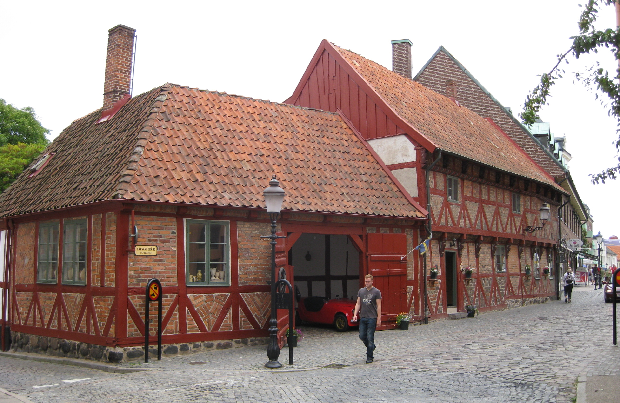 Det gamla apotekshuset i Ystad